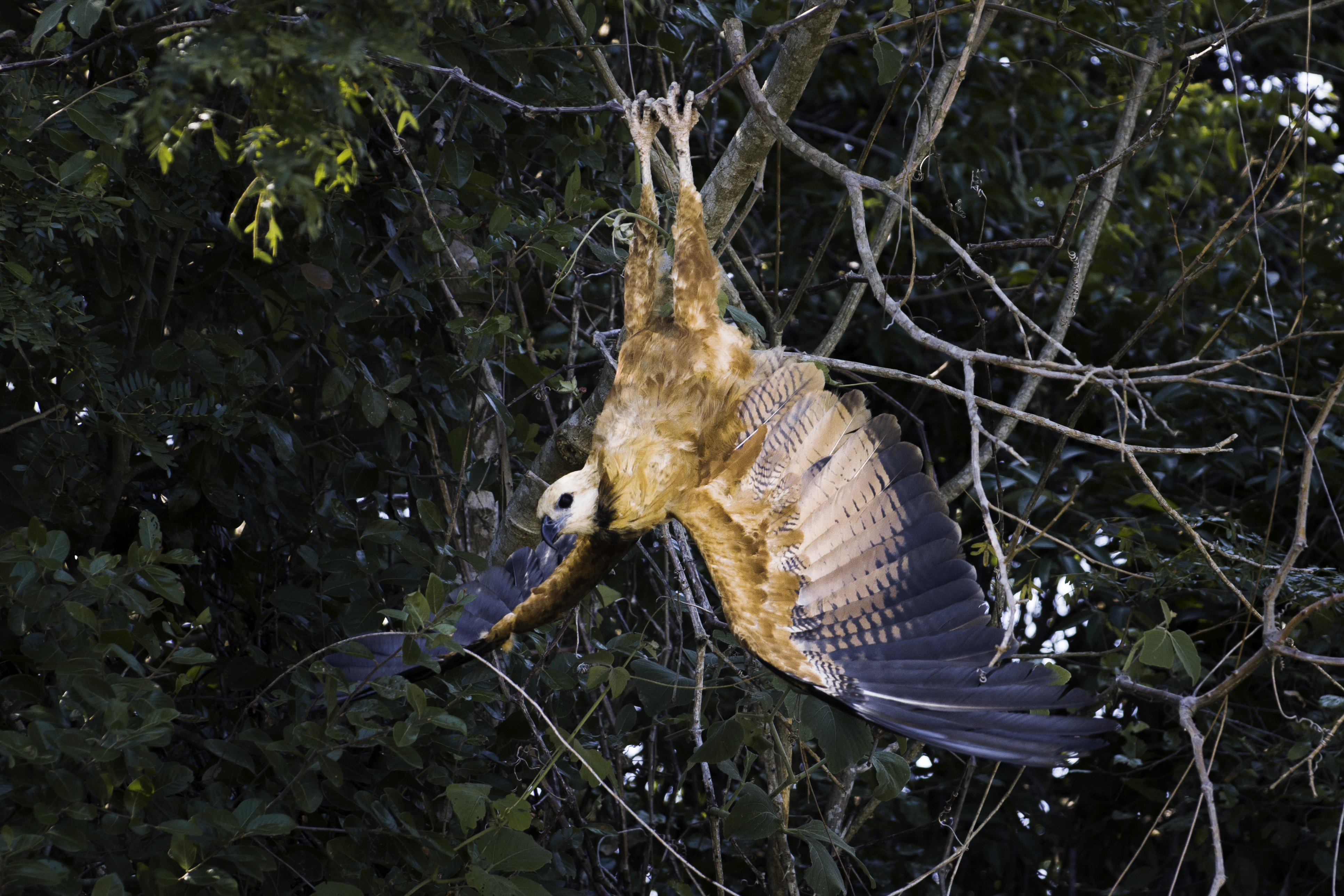 Posição de defesa do Gavião Belo.